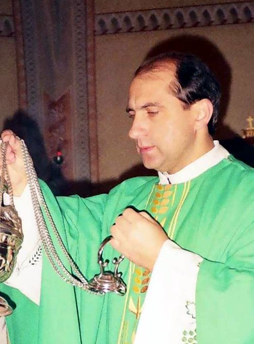 Bernard Bober